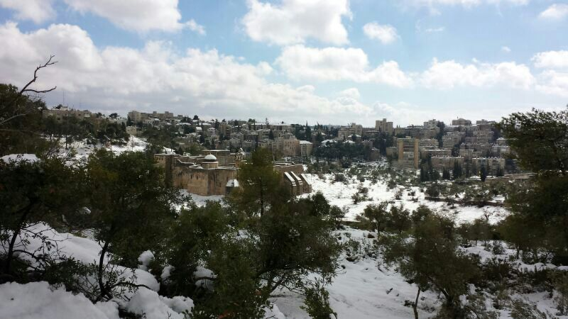 שלג בירושלים - סופת שלגים אחת הגדולות, ב-13 בדצמבר 2013 מנזר המצלבה ועמק המצלבה